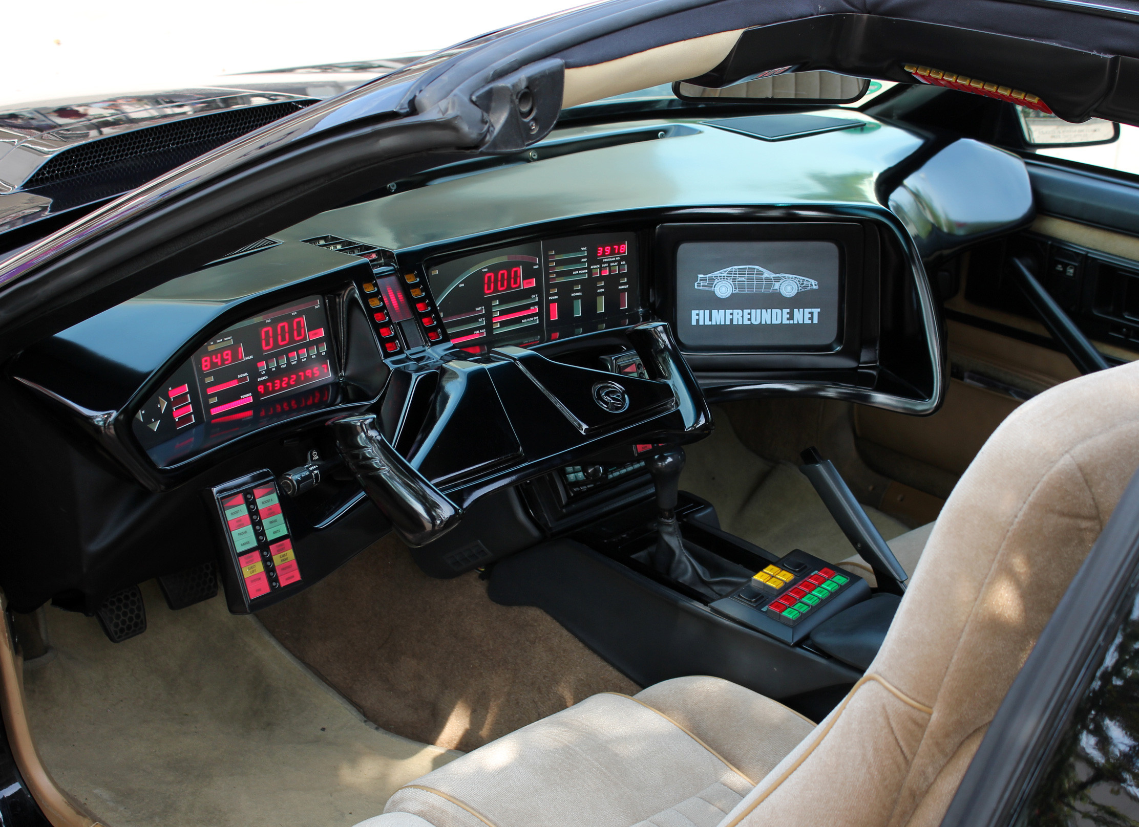 Nachbau des Staffel 3/4 Cockpits im Replica von myKITT aus Erfurt